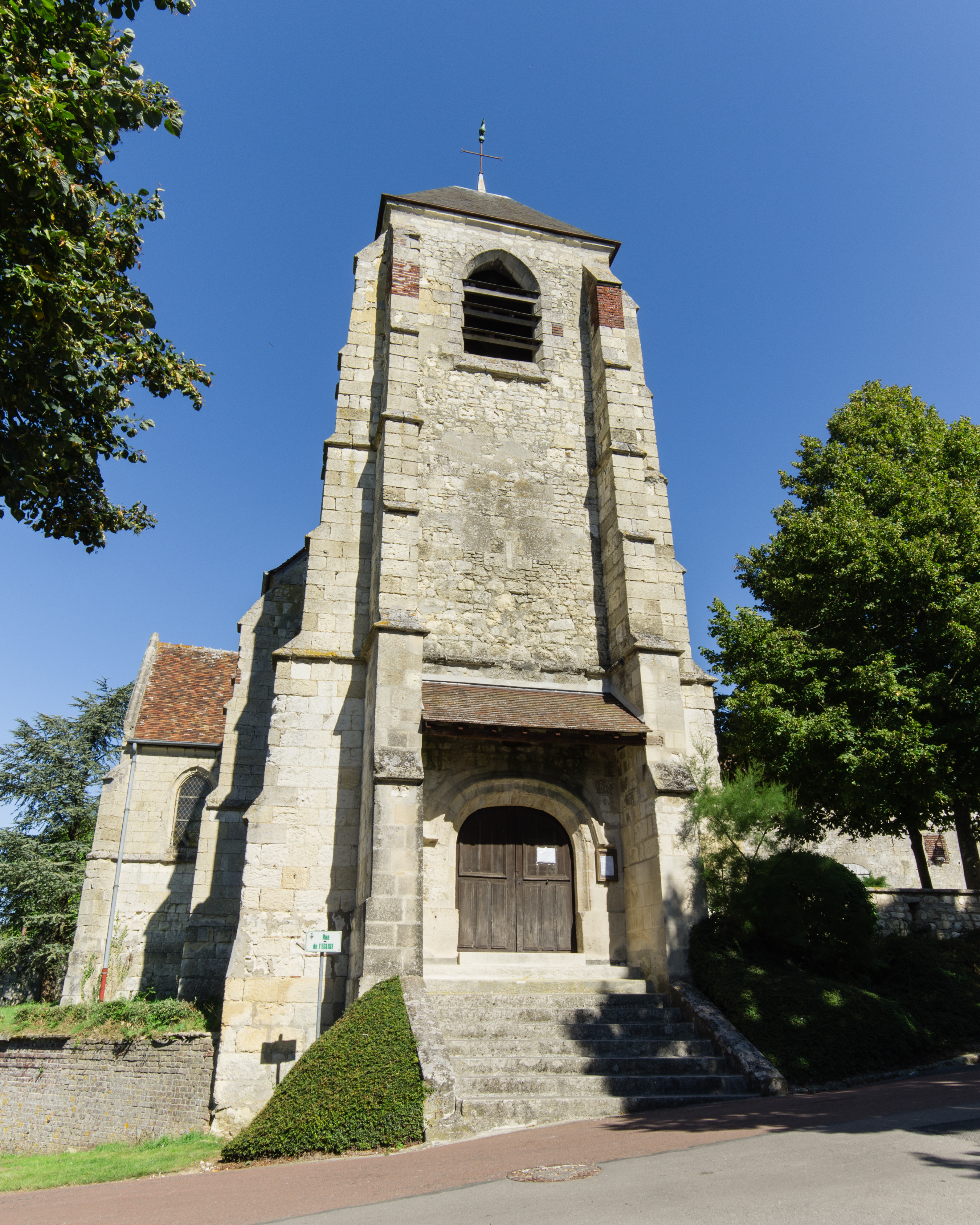 Église Notre-Dame de Lachelle .